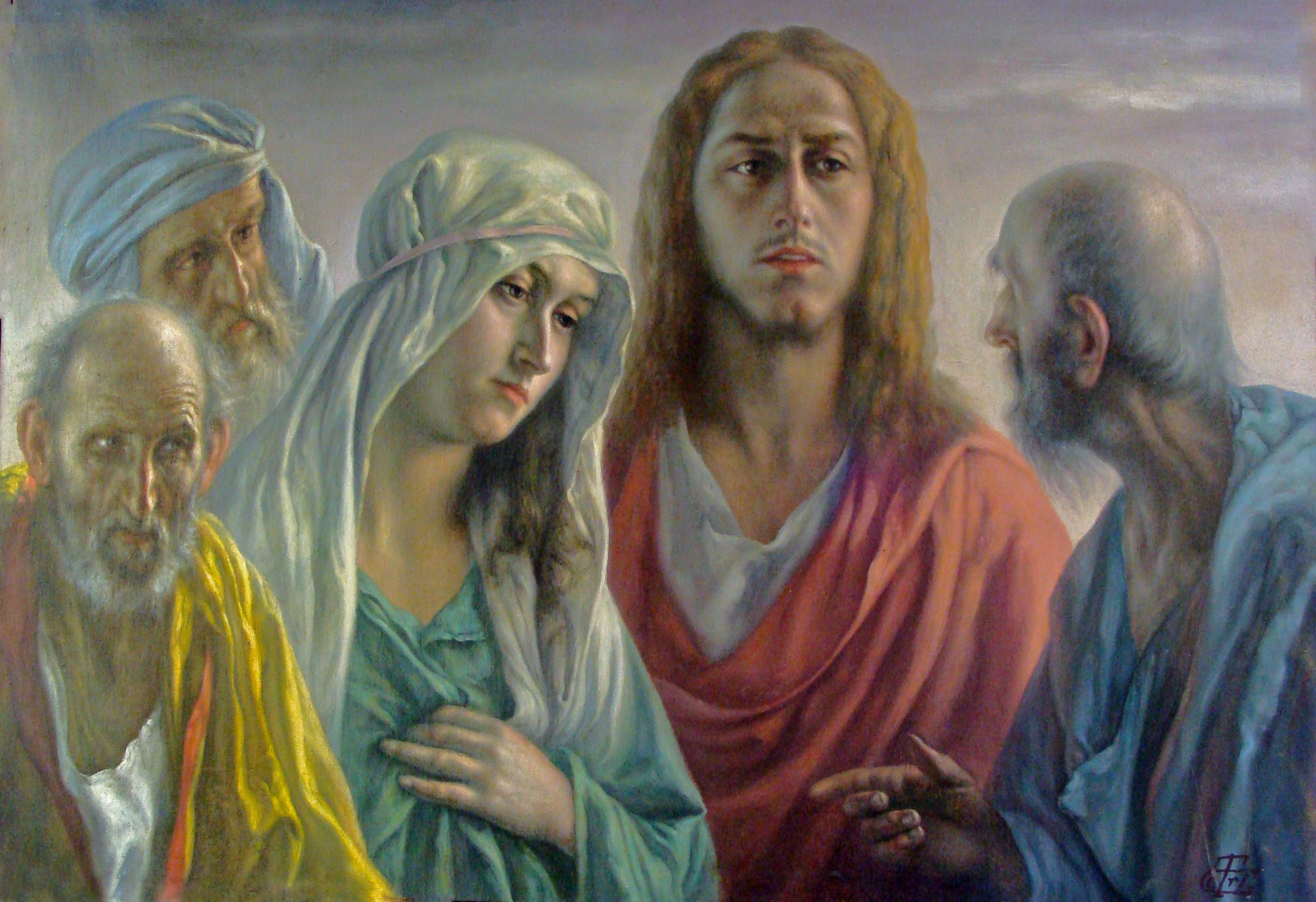 Tableau de Tita Gori, artiste-peintre repésentant Jésus-Christ entouré de disciples et d'une sainte femme.